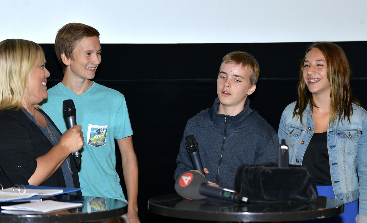 Pojken med guldbyxorna presenteras i Filmhuset i Stockholm den 18 augusti 2014.